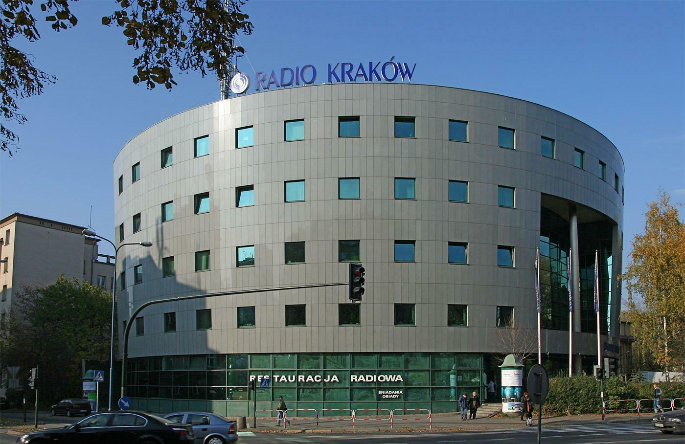 Budynek Radia Kraków